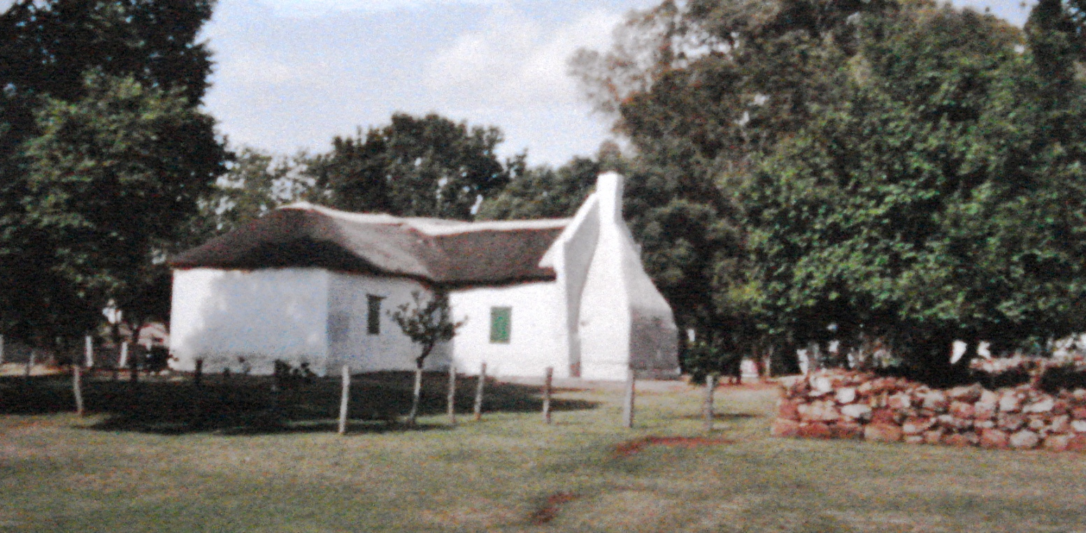 Gebäude im Pinoneer Museum in Pretoria